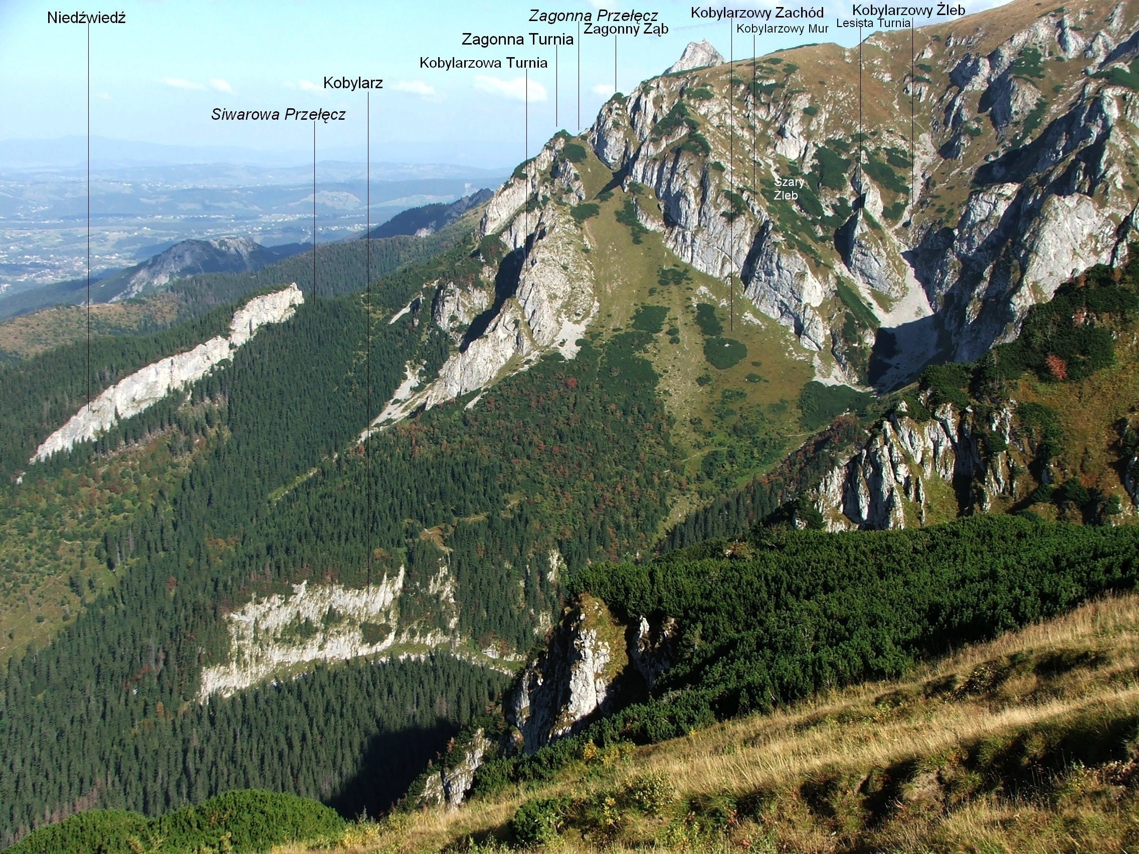 Widok z grzbietu Ciemniaka